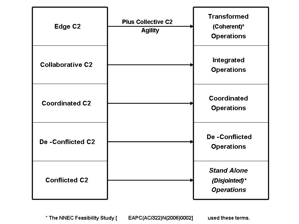 Illustrasjon av modenhetsnivåene i NATO NEC C2 Maturity Model under utvikling i NATO RTO SAS-065, og hvorledes denne modellen er lenket sammen med NATO NEC Maturity Model